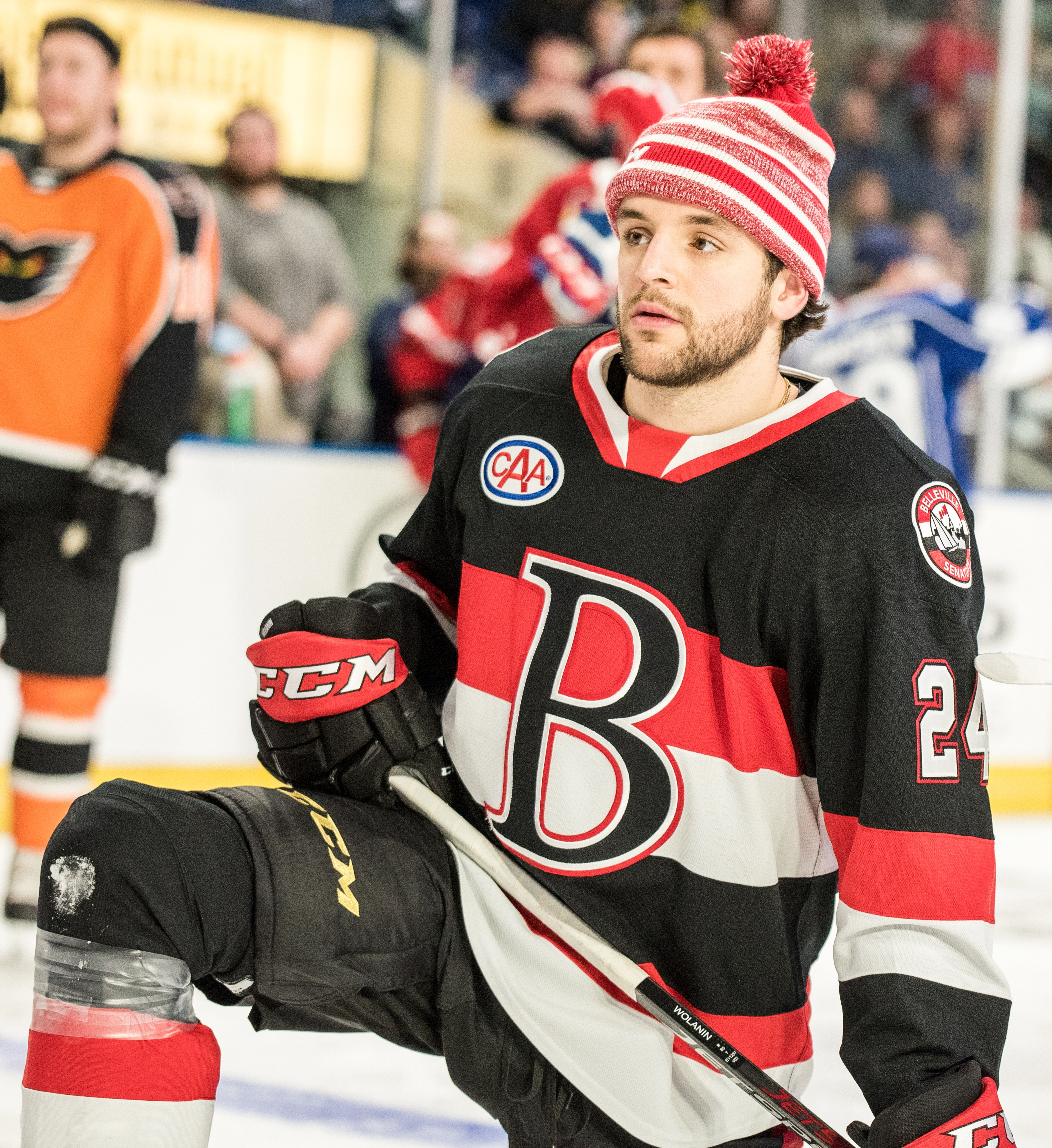 CYW_1565